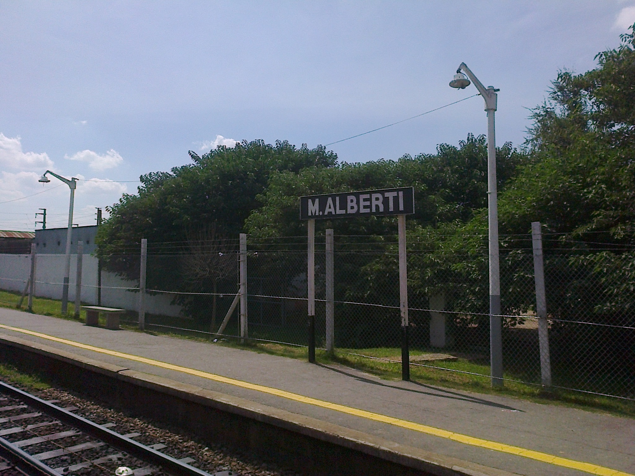 Foto del Nomenclador